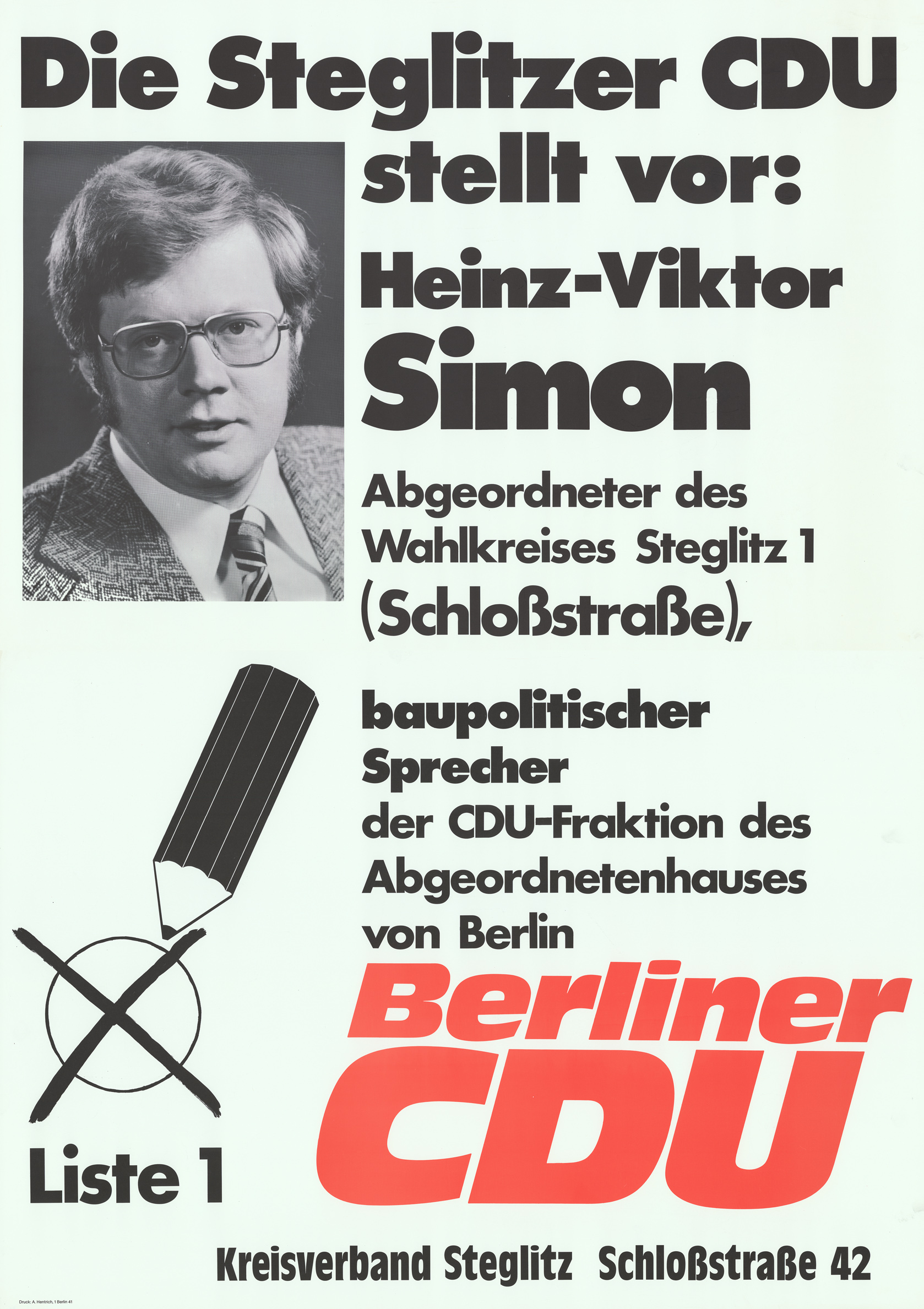 Die Steglitzer CDU stellt vor: Heinz-Viktor Simon ... baupolitischer Sprecher der CDU-Fraktion des Abgeordnetenhauses von Berlin Liste 1 Berliner CDU Kreisverband Steglitz ... Abbildung: Porträtfoto - Bleistift mit Stimmkreuz Kommentar: Zweiteiliges Plakat Plakatart: Kandidaten-/Personenplakat mit Porträt Auftraggeber: KV Steglitz Drucker_Druckart_Druckort: A. Hentrich, Berlin-Steglitz Objekt-Signatur: 10-004 : 539 Bestand: Plakate zu Abgeordnetenhauswahlen Berlin (10-004) GliederungBestand10-18: Plakate zu Abgeordnetenhauswahlen Berlin (10-004) » CDU Lizenz: KAS/ACDP 10-004 : 539 CC-BY-SA 3.0 DE